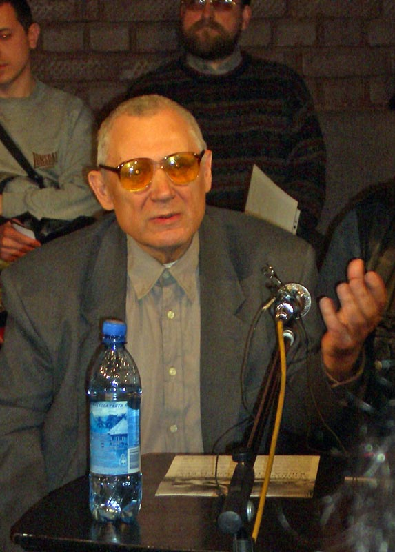 Yuriy Mamleev (Мамлеев, Юрий Витальевич), Russian writer.